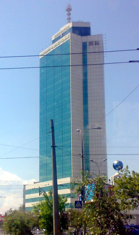 Будівля Міністерства транспорту України